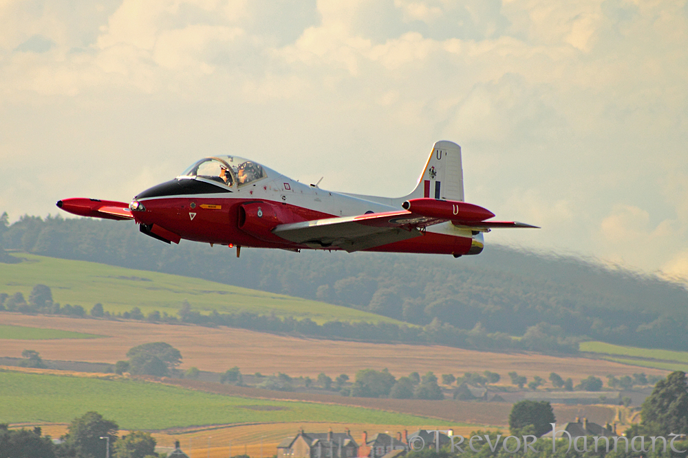 Jet Provost